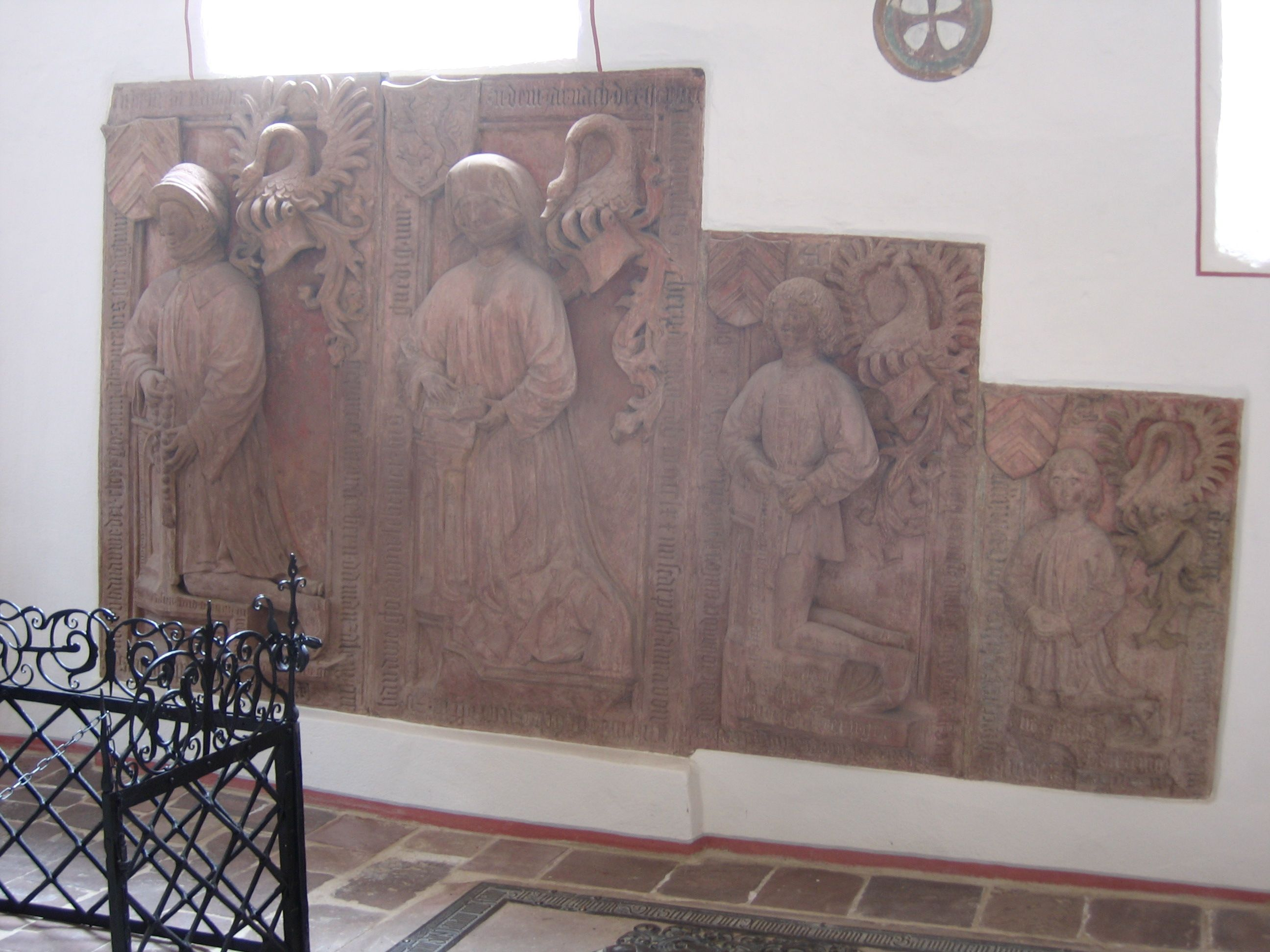 Stadtkirche Babenhausen, Epitaphien von Philipp I. von Hanau-Lichtenberg, seiner Frau und zwei Söhnen